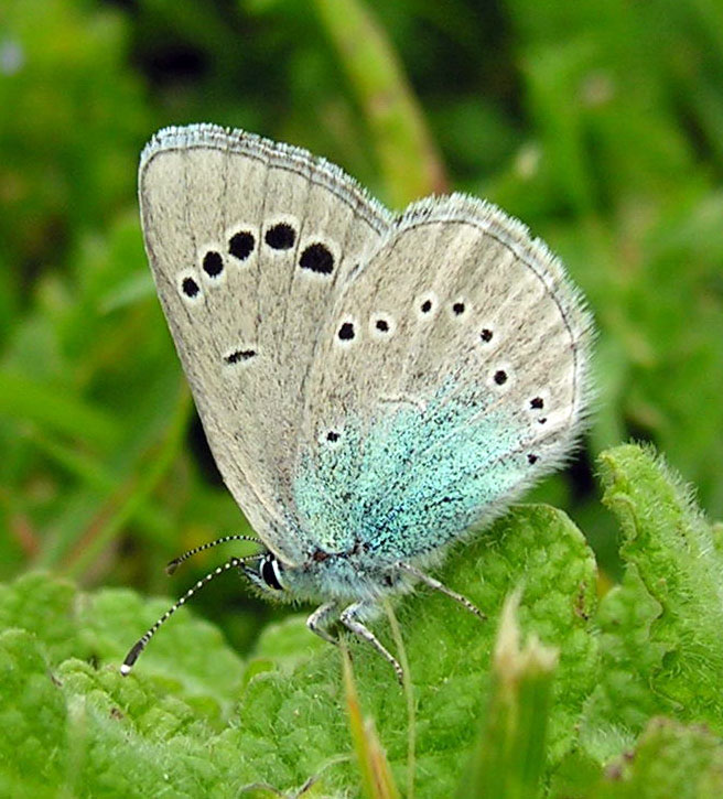 Foto dunha bolboreta. 7 de Maio de 2006 en Mandaio, Oza dos Ríos, Galicia Publish by= Luis Miguel Bugallo Sánchez. Self made